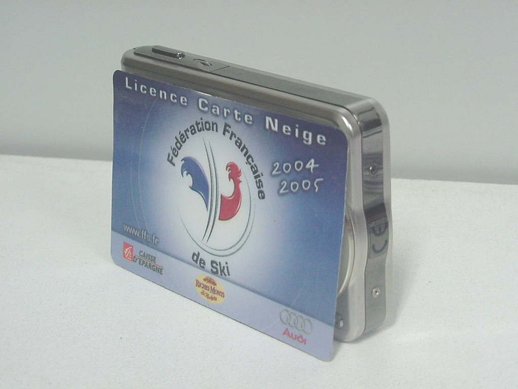 Appareil photographique numérique Casio Exilim EX-S100 - Comparatif avec carte de crédit